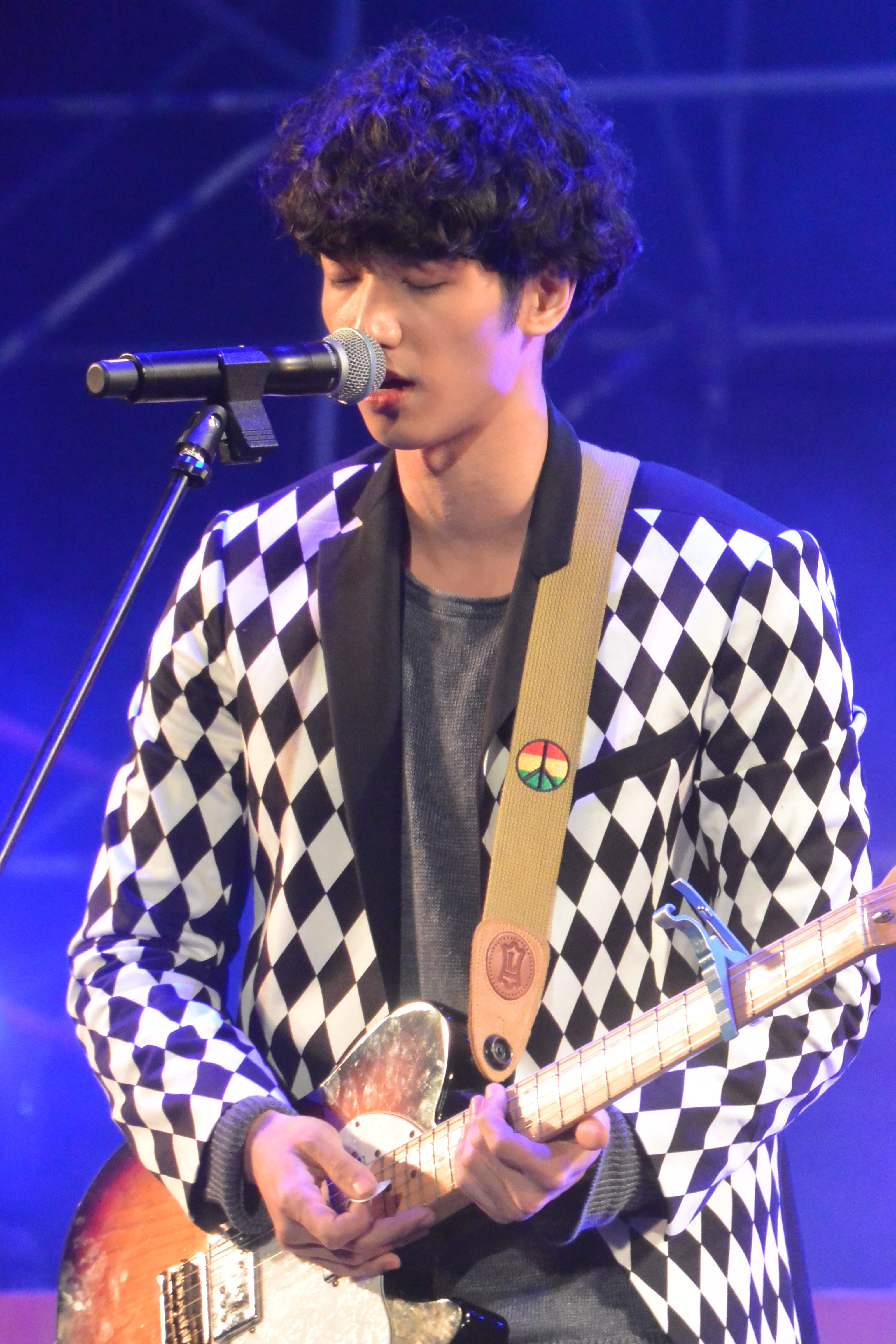 幸福嘉義市 2014年跨年晚會